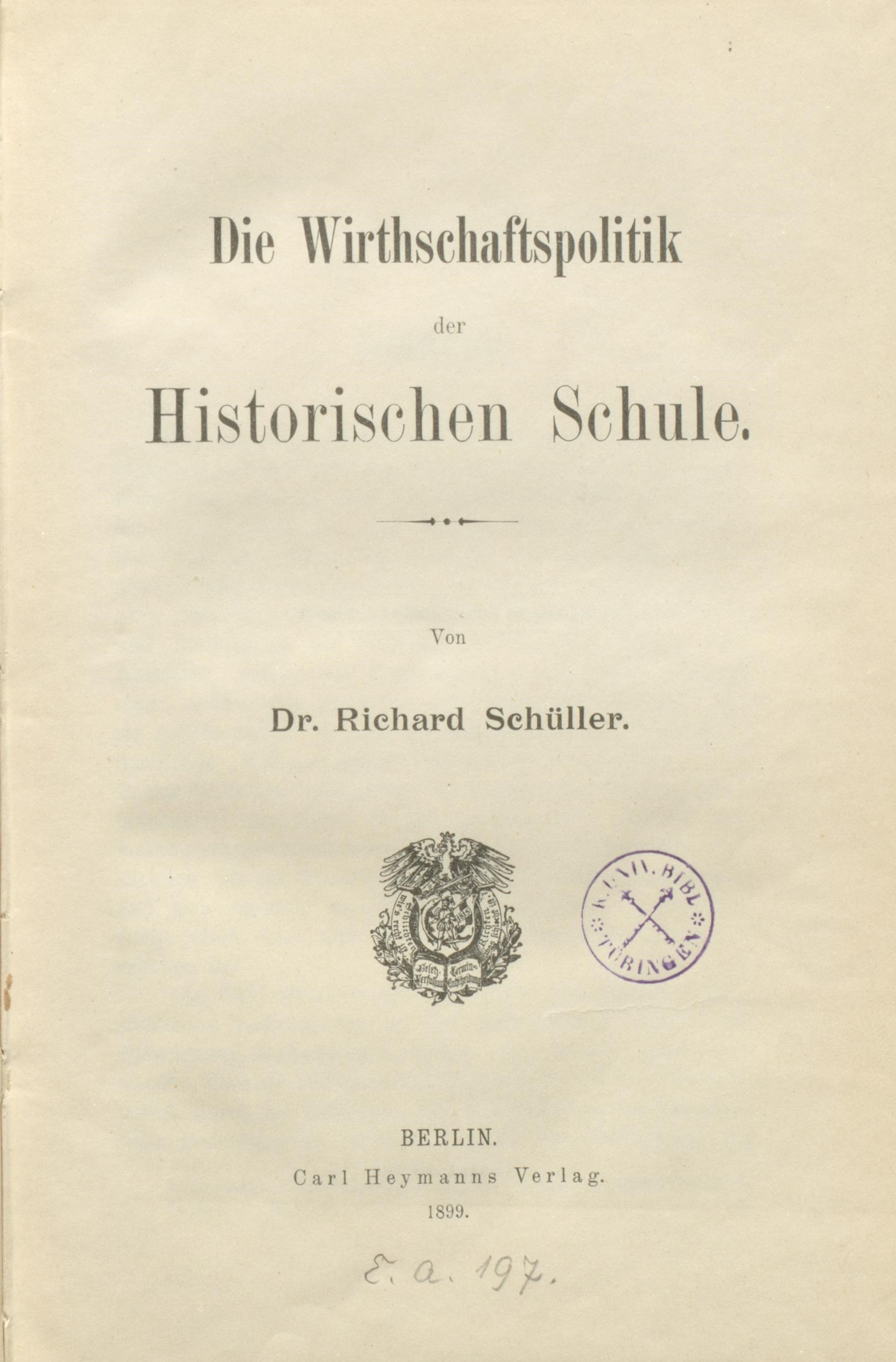 Richard Schüller Die Wirthschaftspolitik der Historischen Schule 1899 Titel